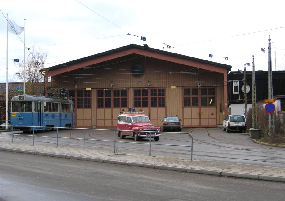 Djurgårdslinjens vagnhall, Alkärrshallen, på Djurgården i Stockholm. Den bruna delen till höger innehåller kontor, omklädningsrum, övernattningsrum och lunchrum. Innanför den högra porten finns en uppvärmd del med verkstad och arbetsgrav. Bakom de tre portarna till vänster om denna finns tre spår i kallutrymme för uppställning av spårvagnar.